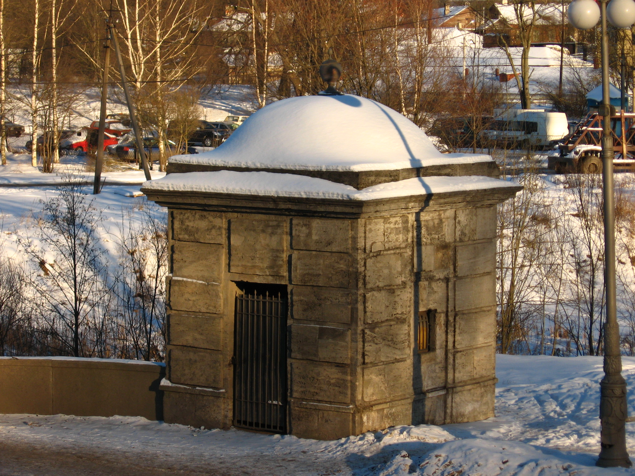 Кордегардия Адмиралтейского моста в Гатчине. Вид с терассы на проспекте 25-го Октября